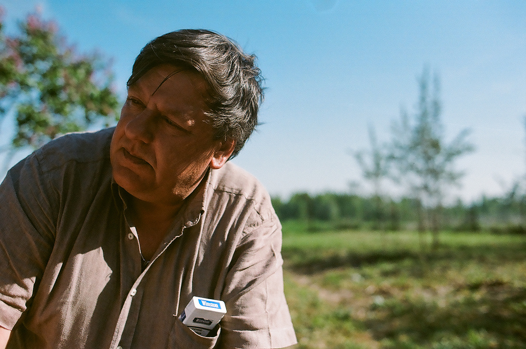 Писатель Петр Алешковский depicted person: Пётр Алешковский (age: 53.68)